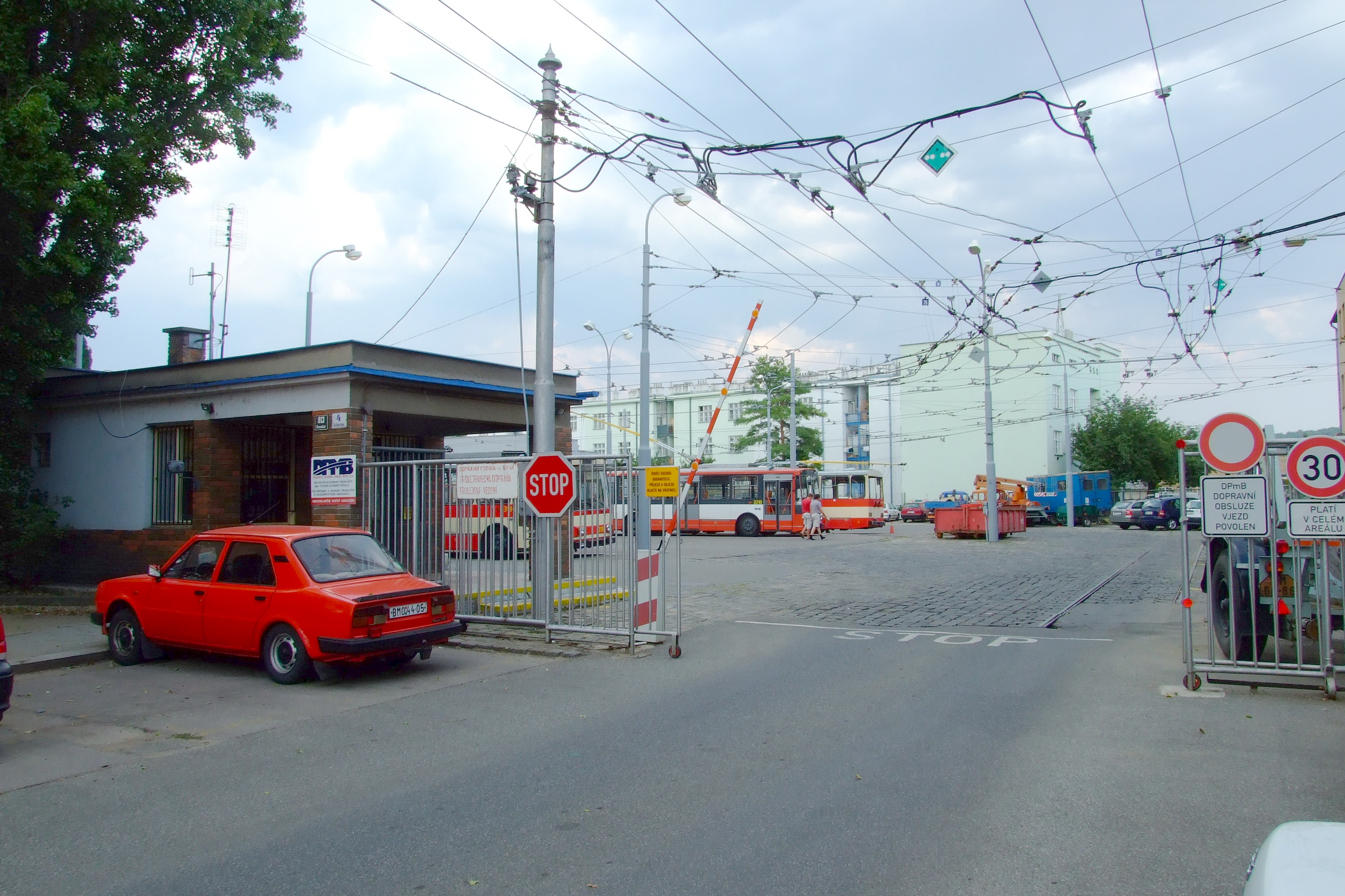 Brno-Husovice - vozovna Husovice